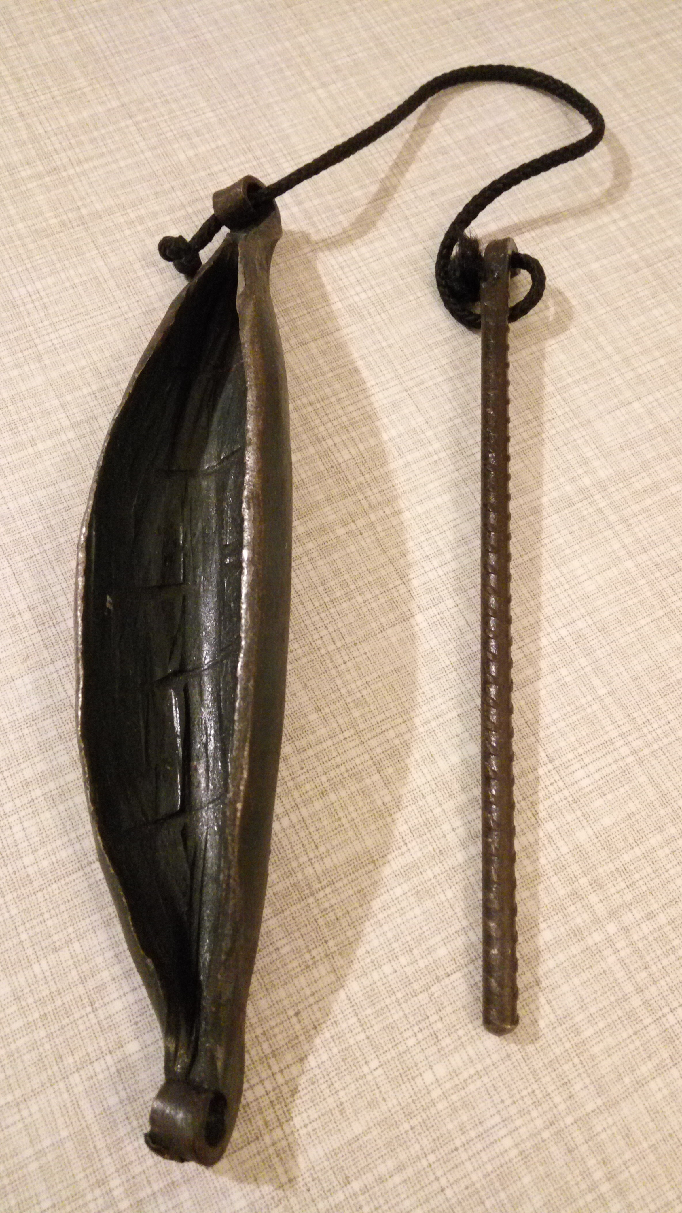 Atoke